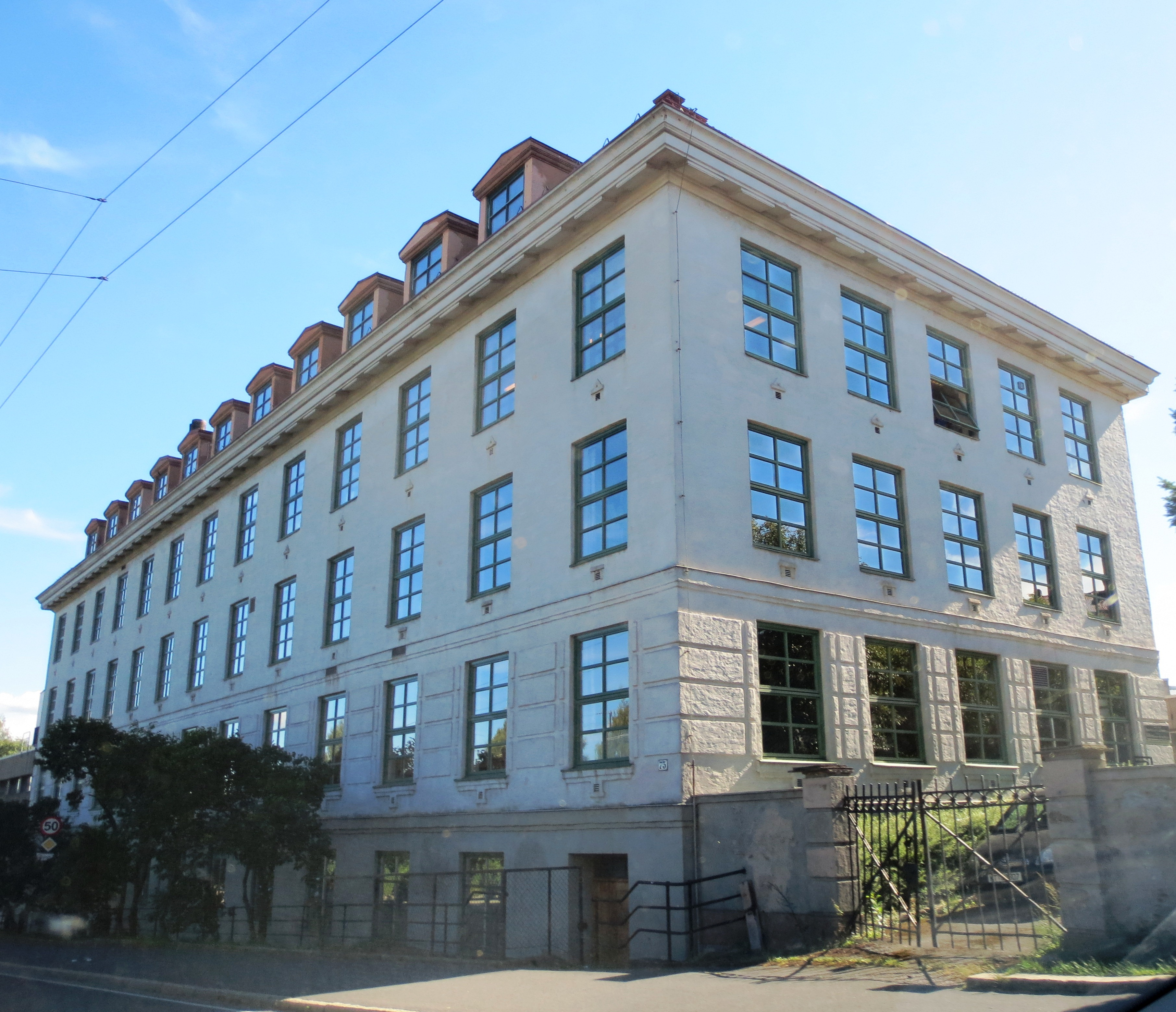 Lokalt vernet bygningsminne på Ullevål, Oslo